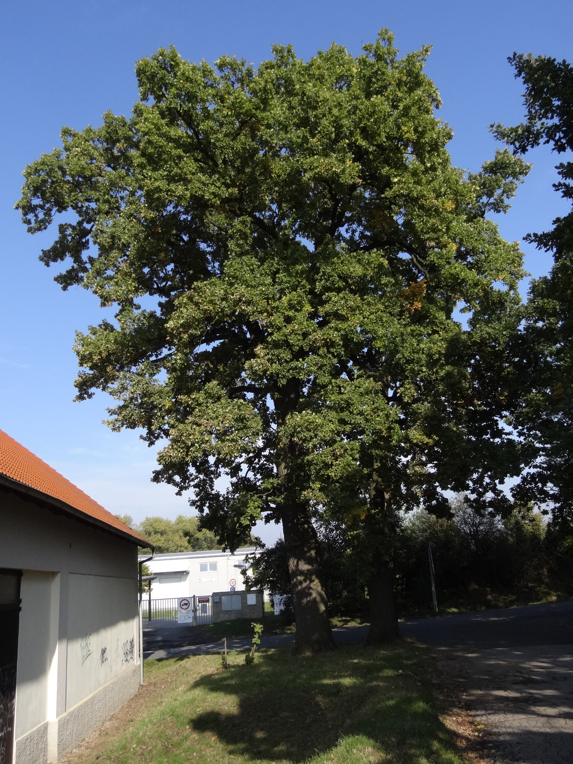 Točná - dva památné duby na rohu ulic Branišovská a K Výboru